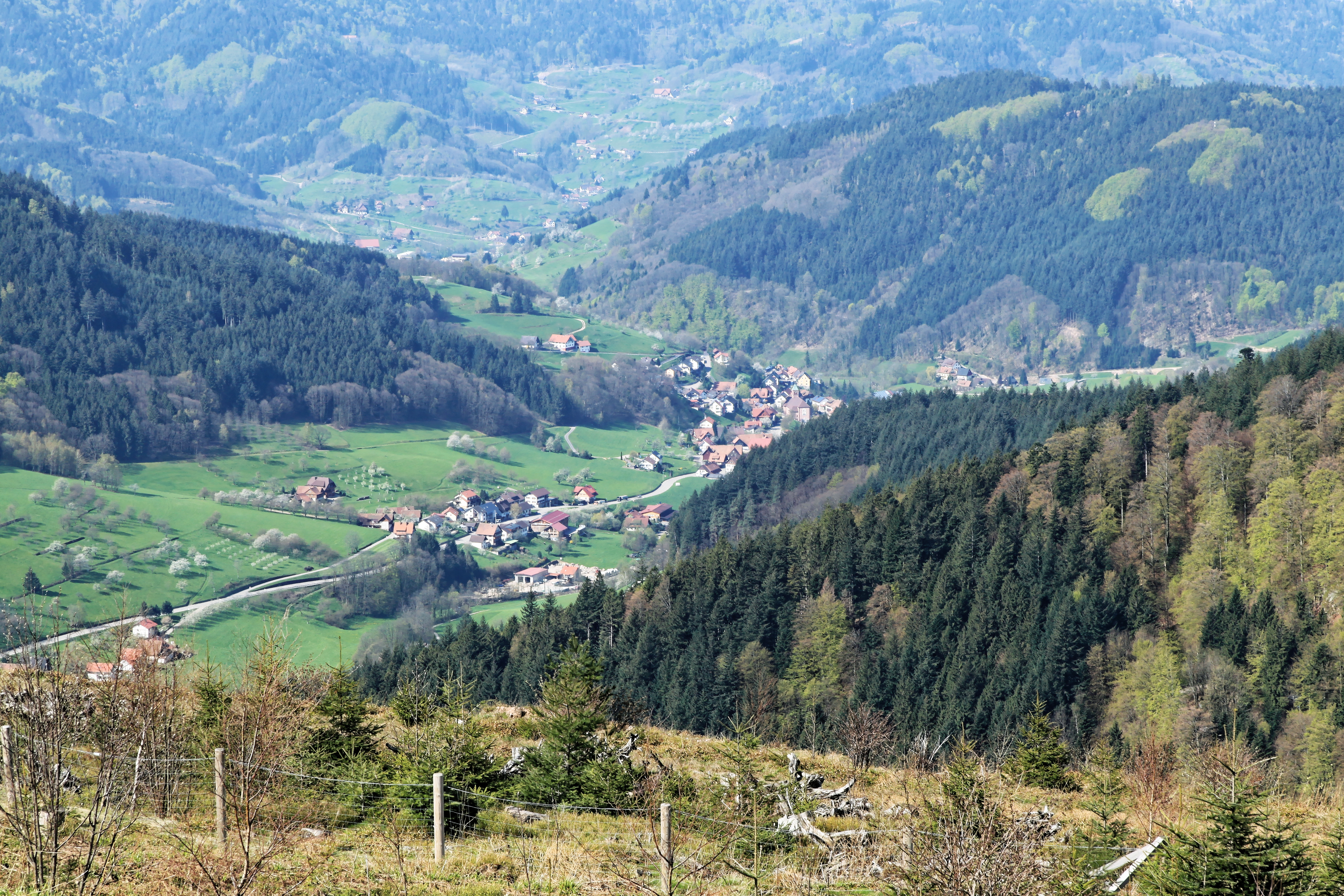 Blick von der Schwarzwaldhochstraße in Seebach (Baden) hinunter auf Seebach (Baden)